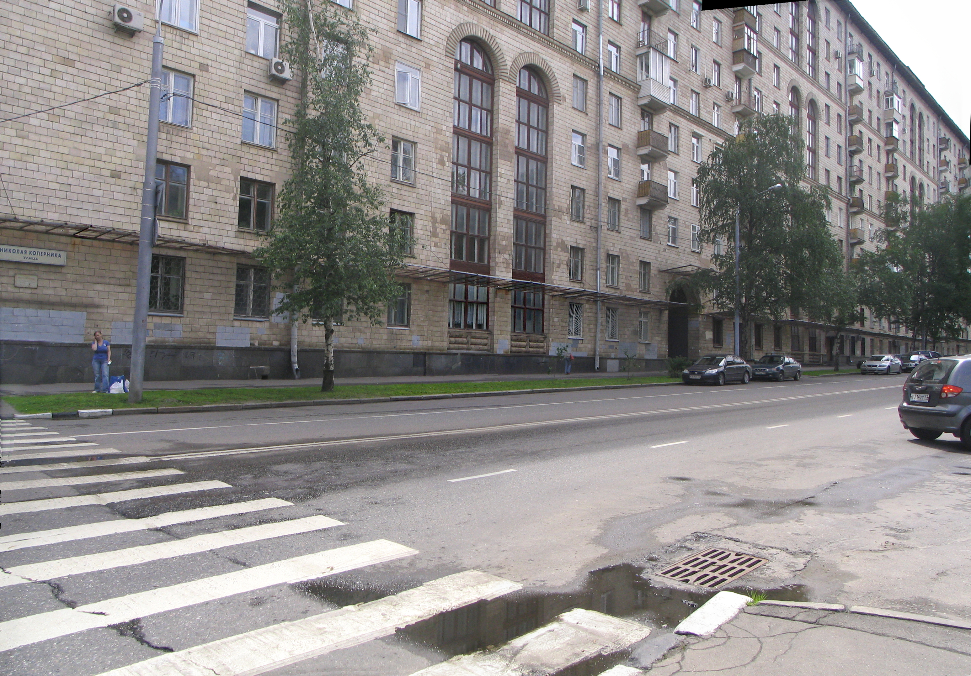 Улица Николая Коперника (Москва). Вид со стороны Университетского проспекта.